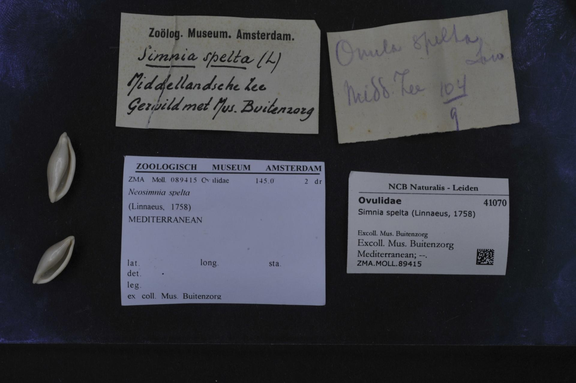 Simnia spelta (Linnaeus, 1758)